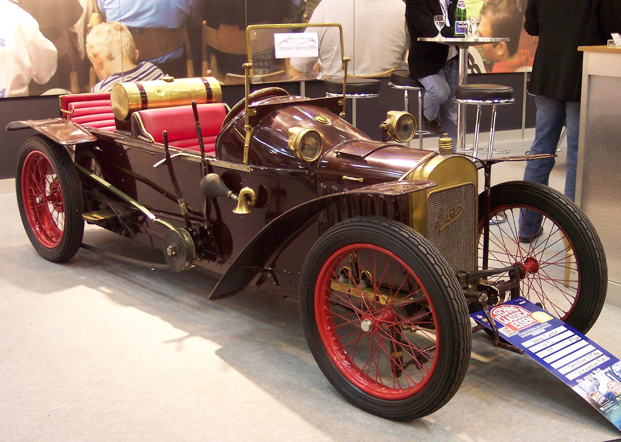 Godefroy + Levegue Super B2, Baujahr 1917, 977cm³ Hubraum